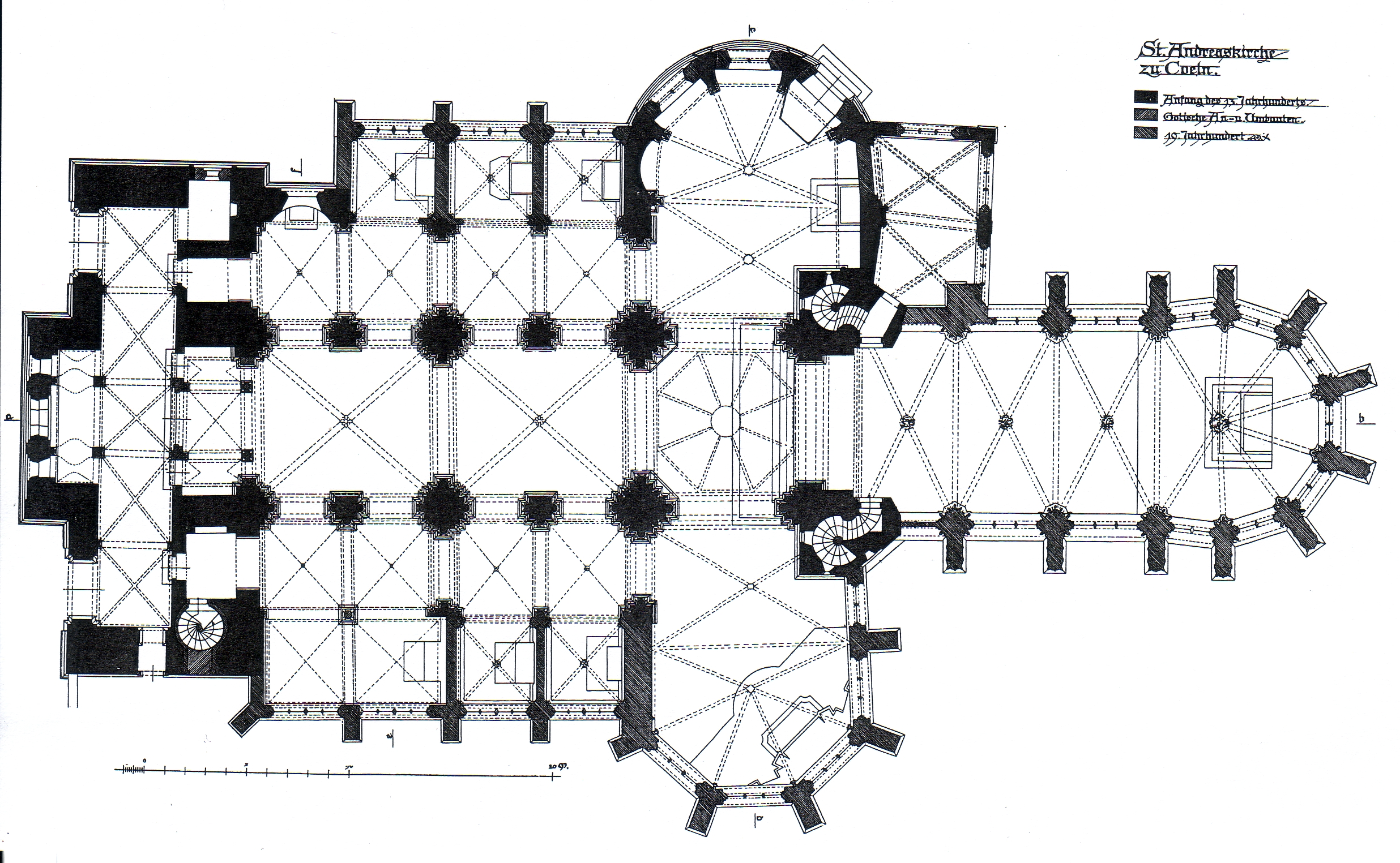 St. Andreas Köln